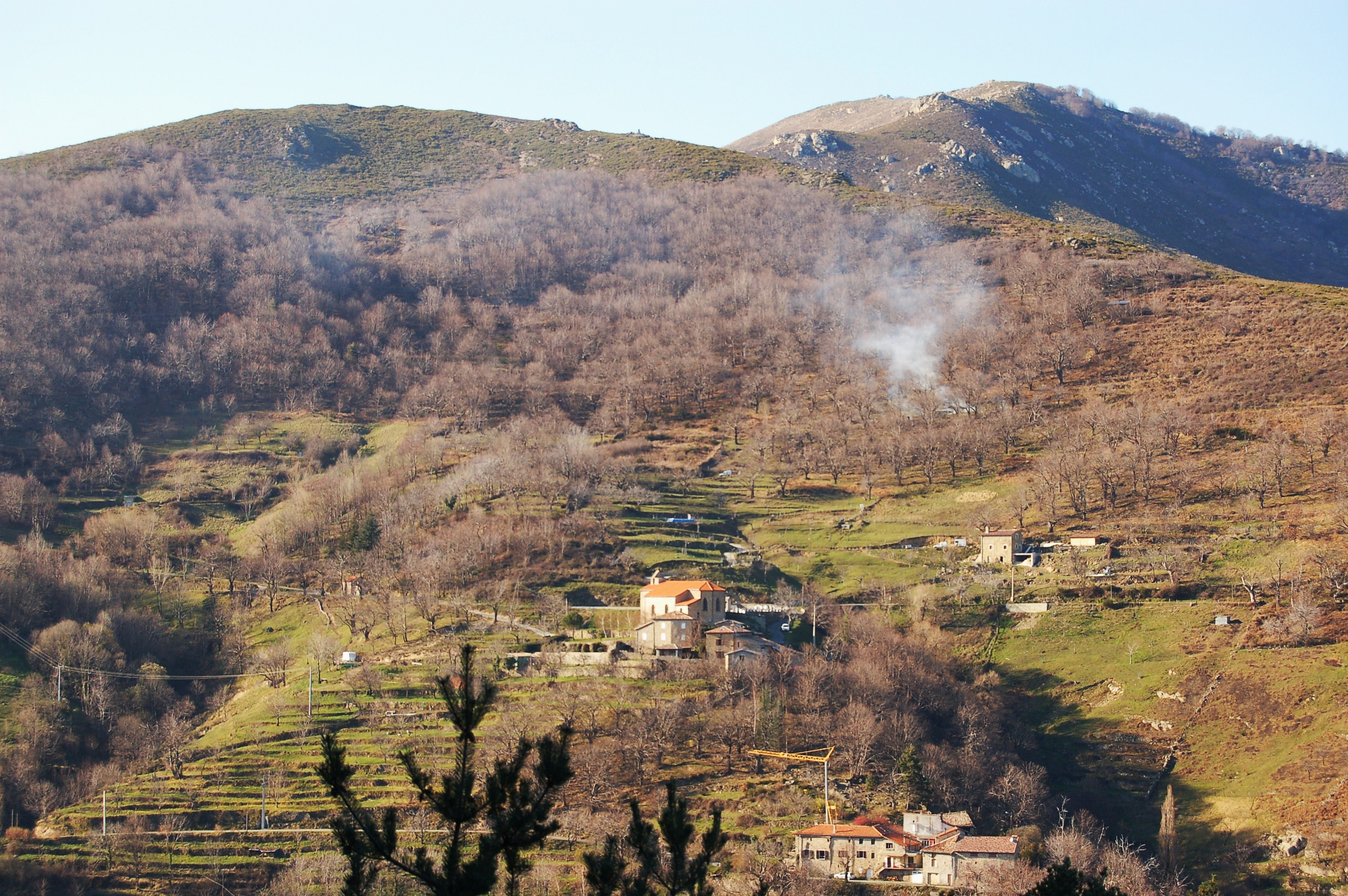 Eglise d'Aizac depuis le volcan